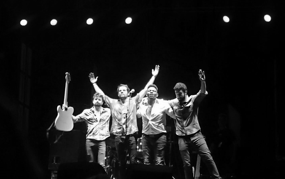 Fotografía del final del concierto del grupo madrileño mientras saludaban al público.